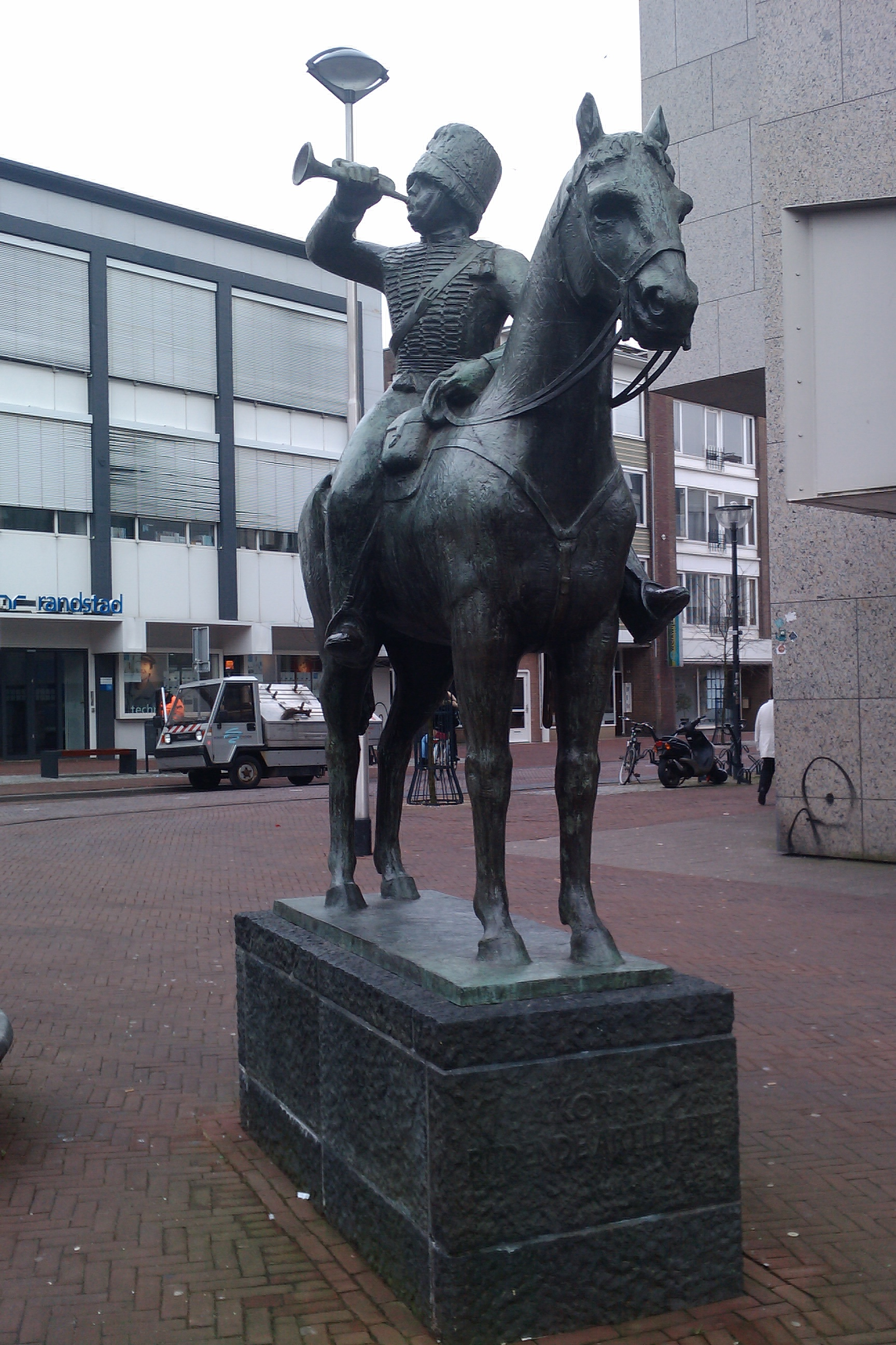 Het standbeeld Gele Rijder op het Gele Rijders Plein in Arnhem ter nagedachtenis aan de voormalige Willemskazerne en de aldaar gevestigde Gele Rijders